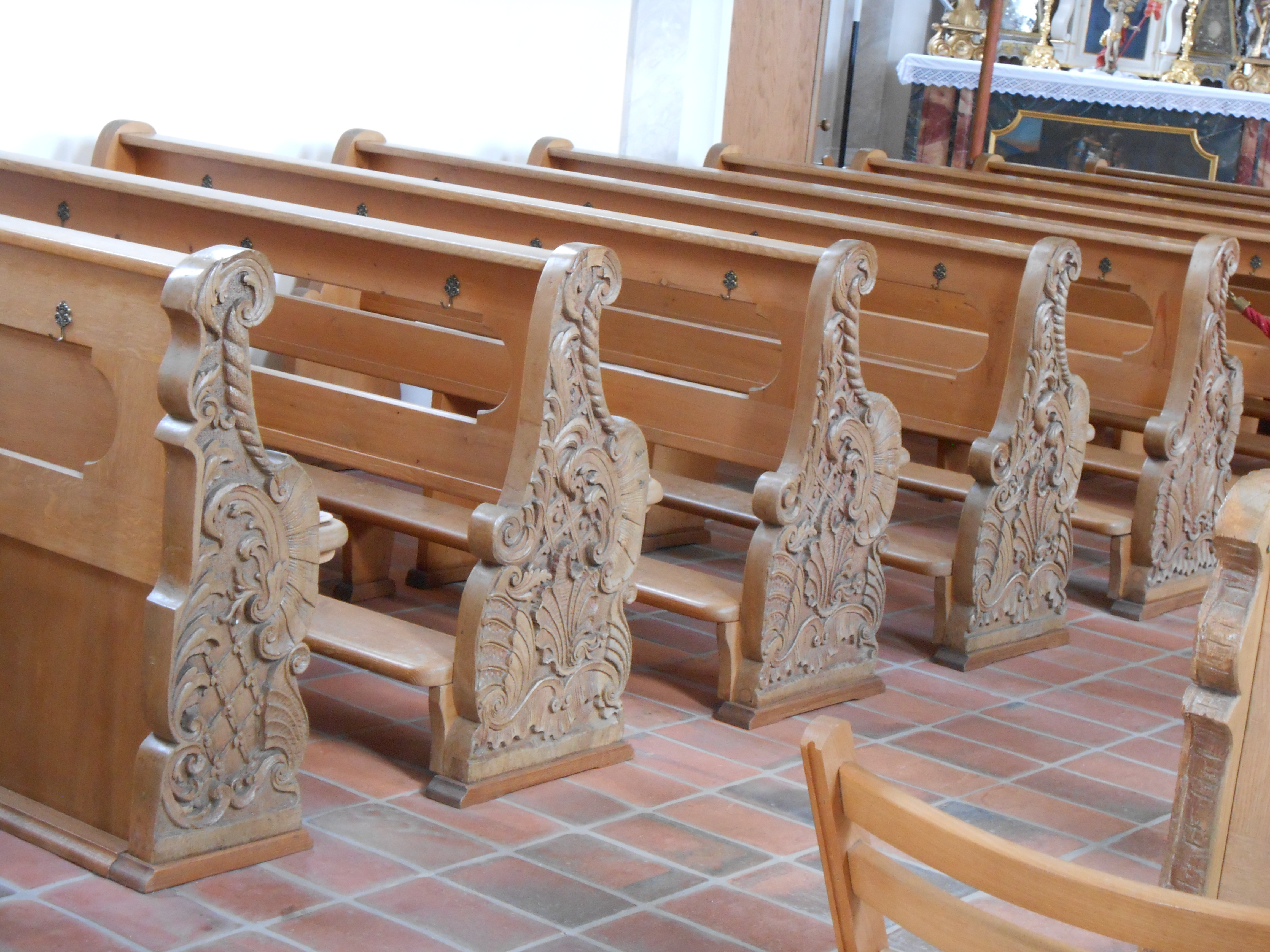 Kirchenbänke von Heilig Kreuz (Mindelaltheim)